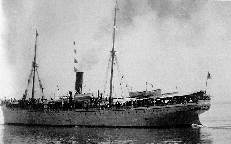 Steamship Angola (1881-1909)